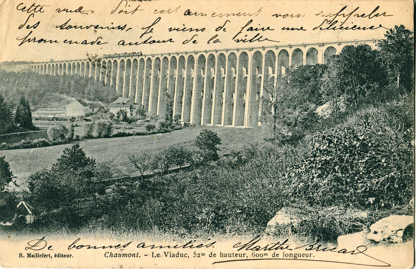 Carte postale ancienne éditée par R. Maillefert :CHAUMONT - Le Viaduc, 52 m. de hauteur, 600 m. de longueur